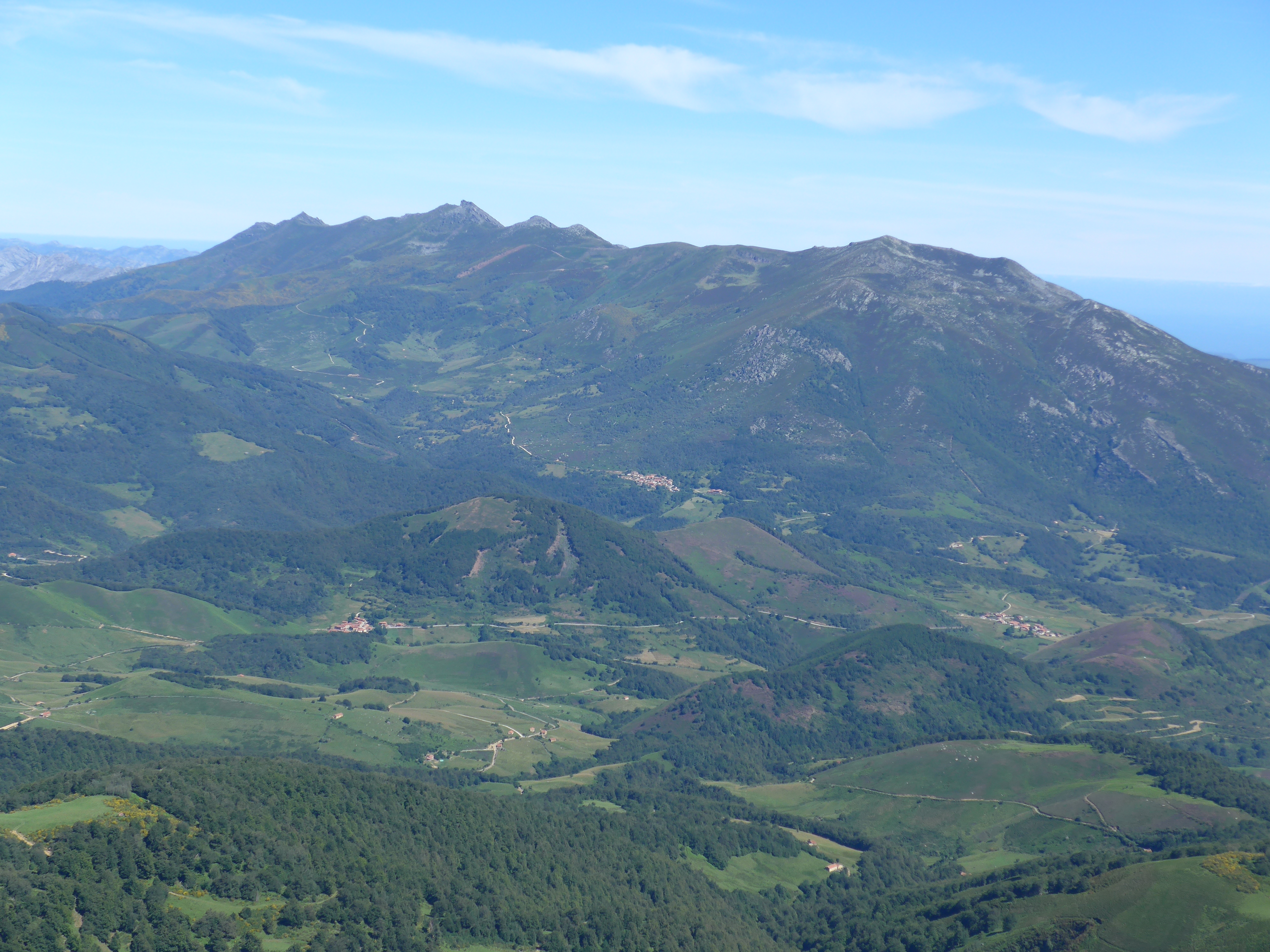 El collado-mirador de la Fuente del Chivo ofrece unas vistas magníficas hacia la sierra de Peña Sagra y el valle de Polaciones.